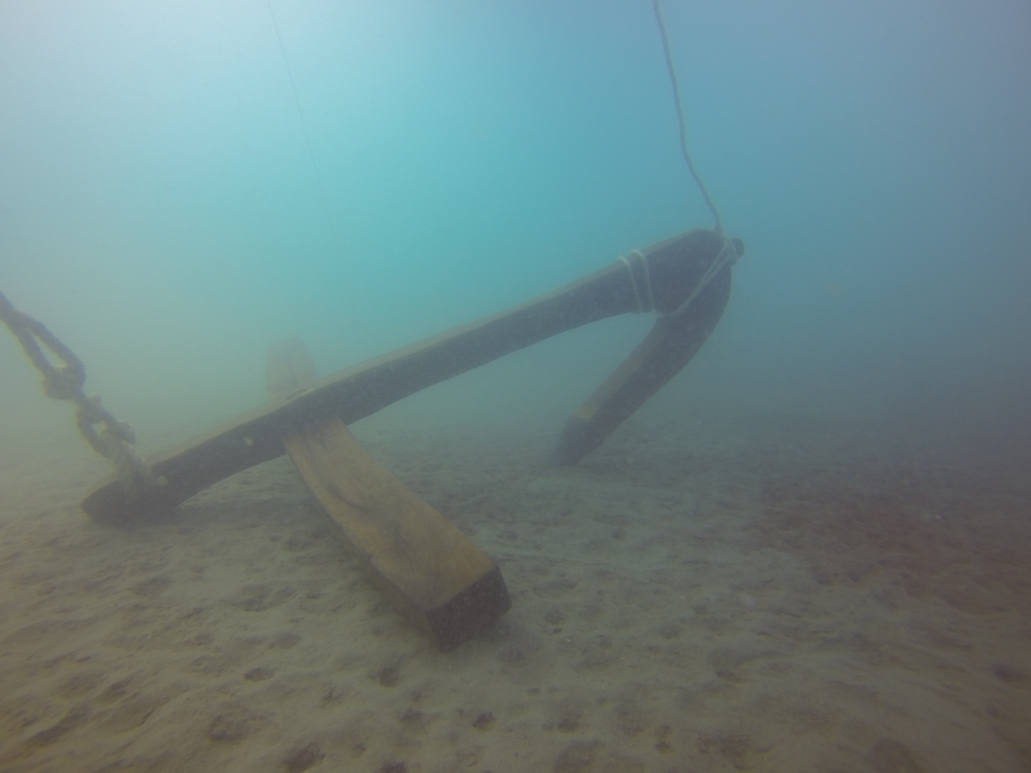 תמונה מניסוי עגינה, ניתן לראות כי מרכז הכובד בציפורן גורם לכך שהעוגן ינחת במנח מתאים לנעיצתו בקרקע